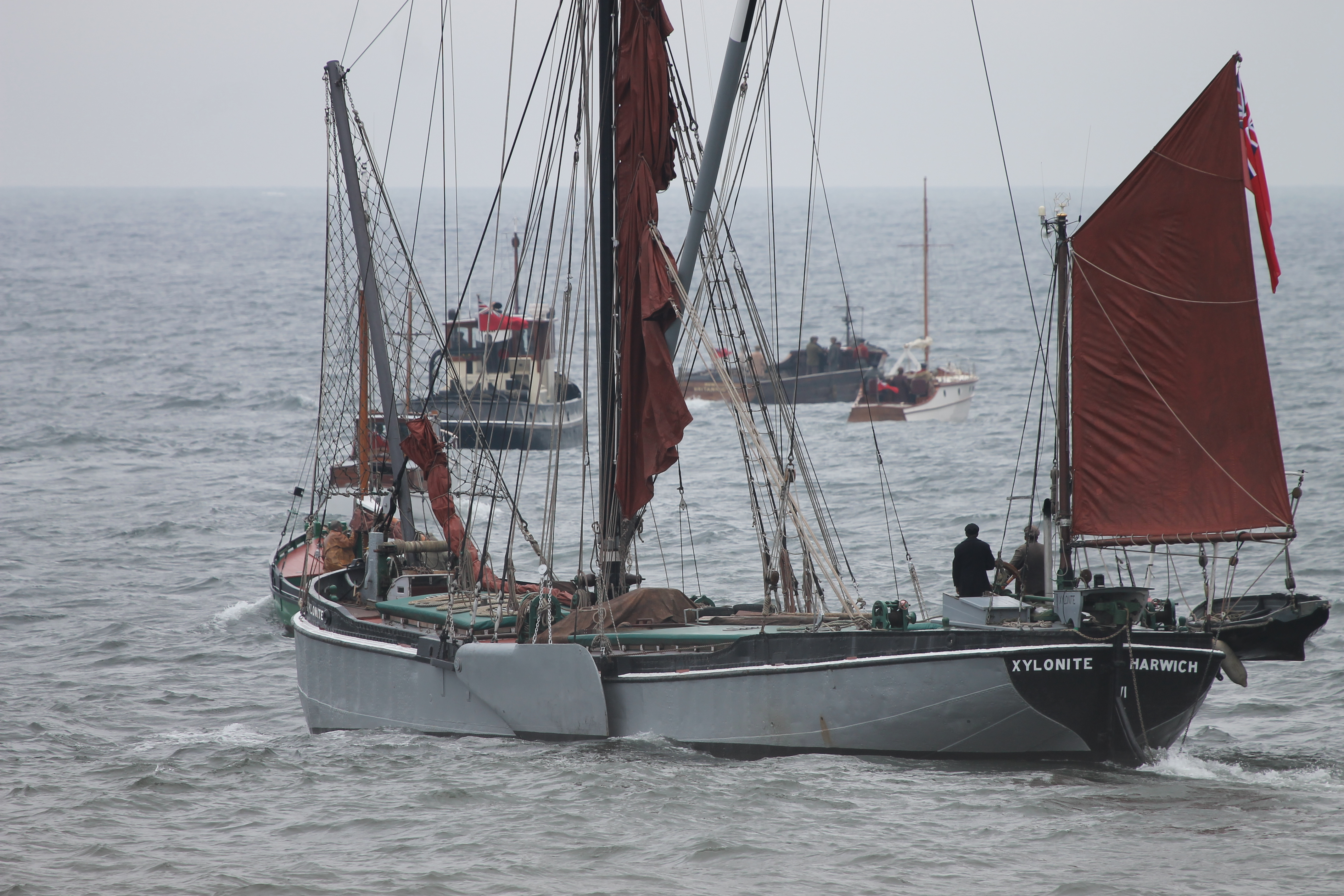 La barge Xylonite, à Dunkerque, pendant le tournage du film "Dunkirk" de Christopher Nolan.